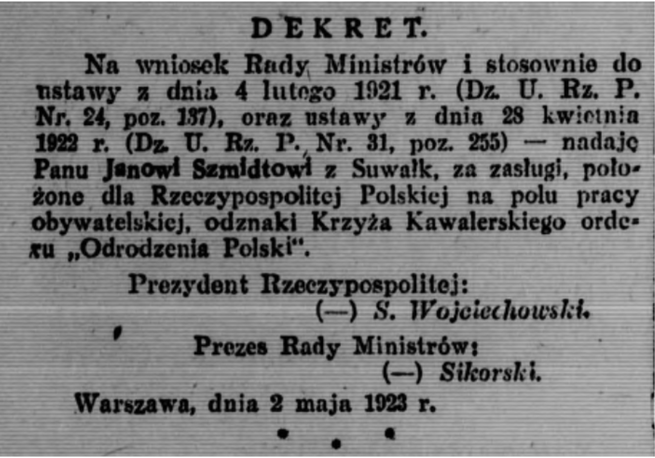 Fragment z Monitora Polskiego. Dziennika Urzędowego Rzeczypospolitej Polskiej (1923.05.02)